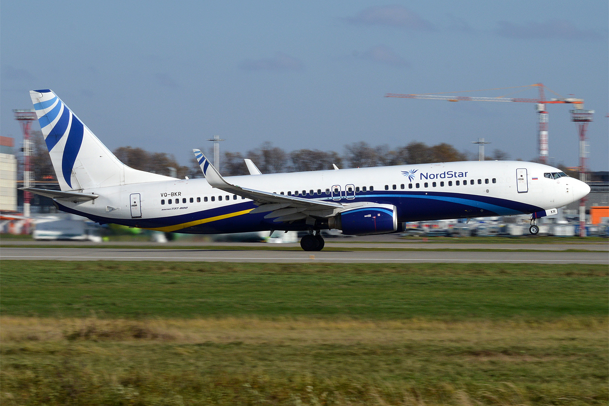 NordStar, VQ-BKR, Boeing 737-8AS